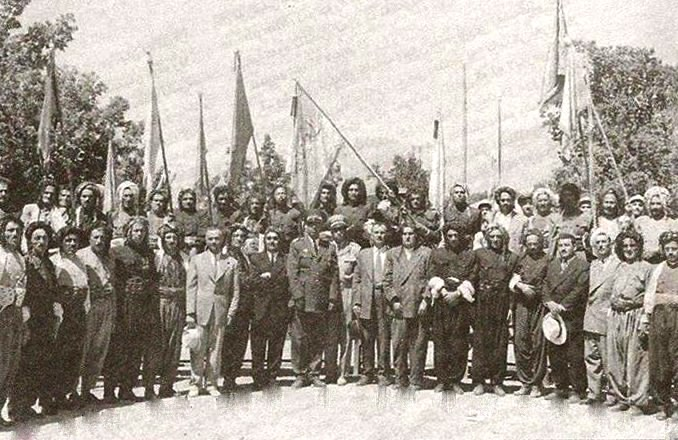 اهالی بوکان در تهران ، 1333